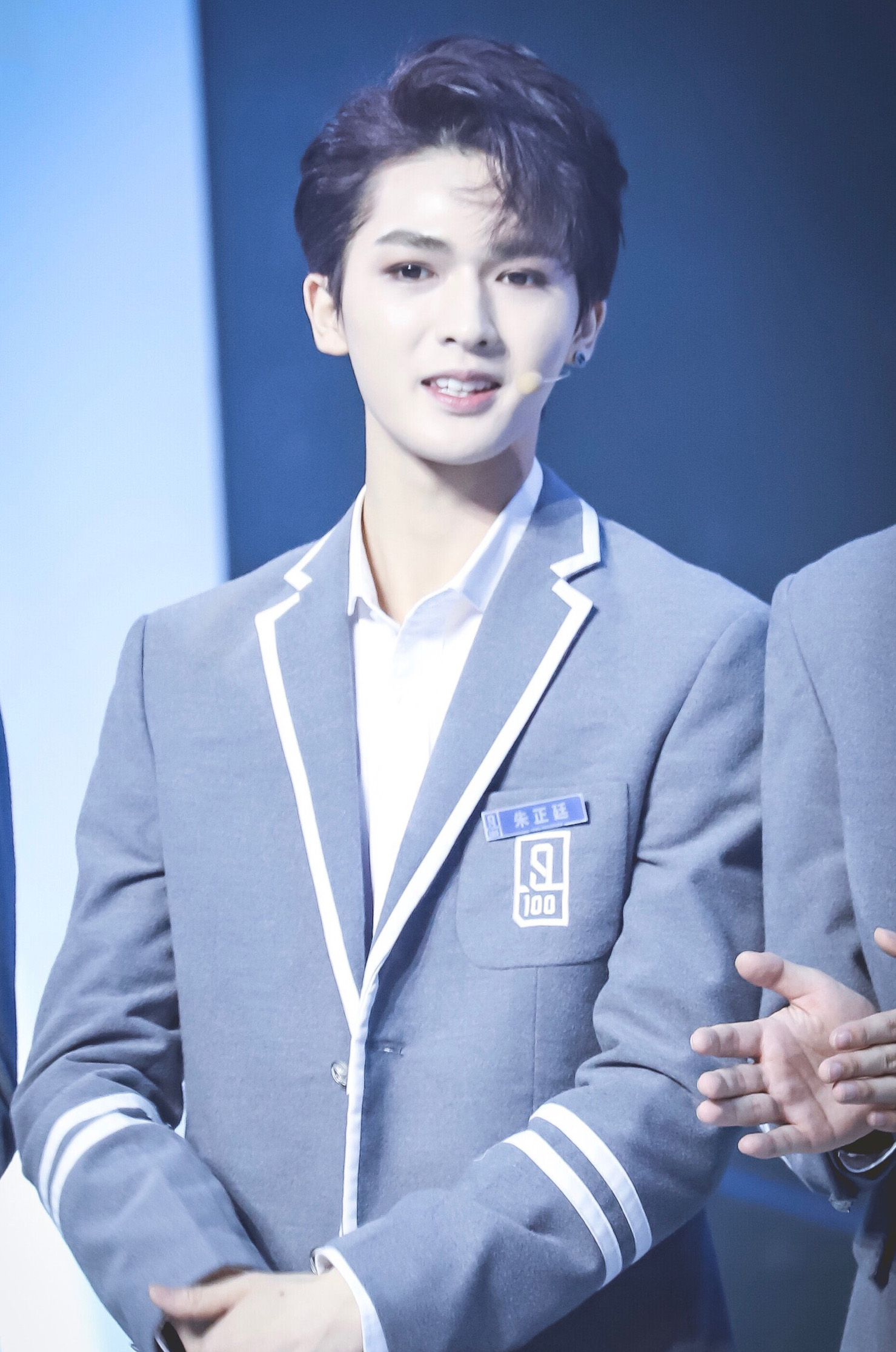 180331 高清 朱正廷